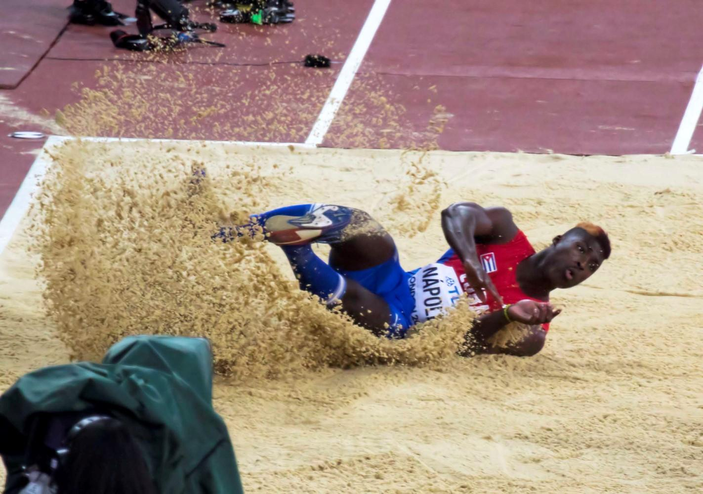 d6_14 hinkstap